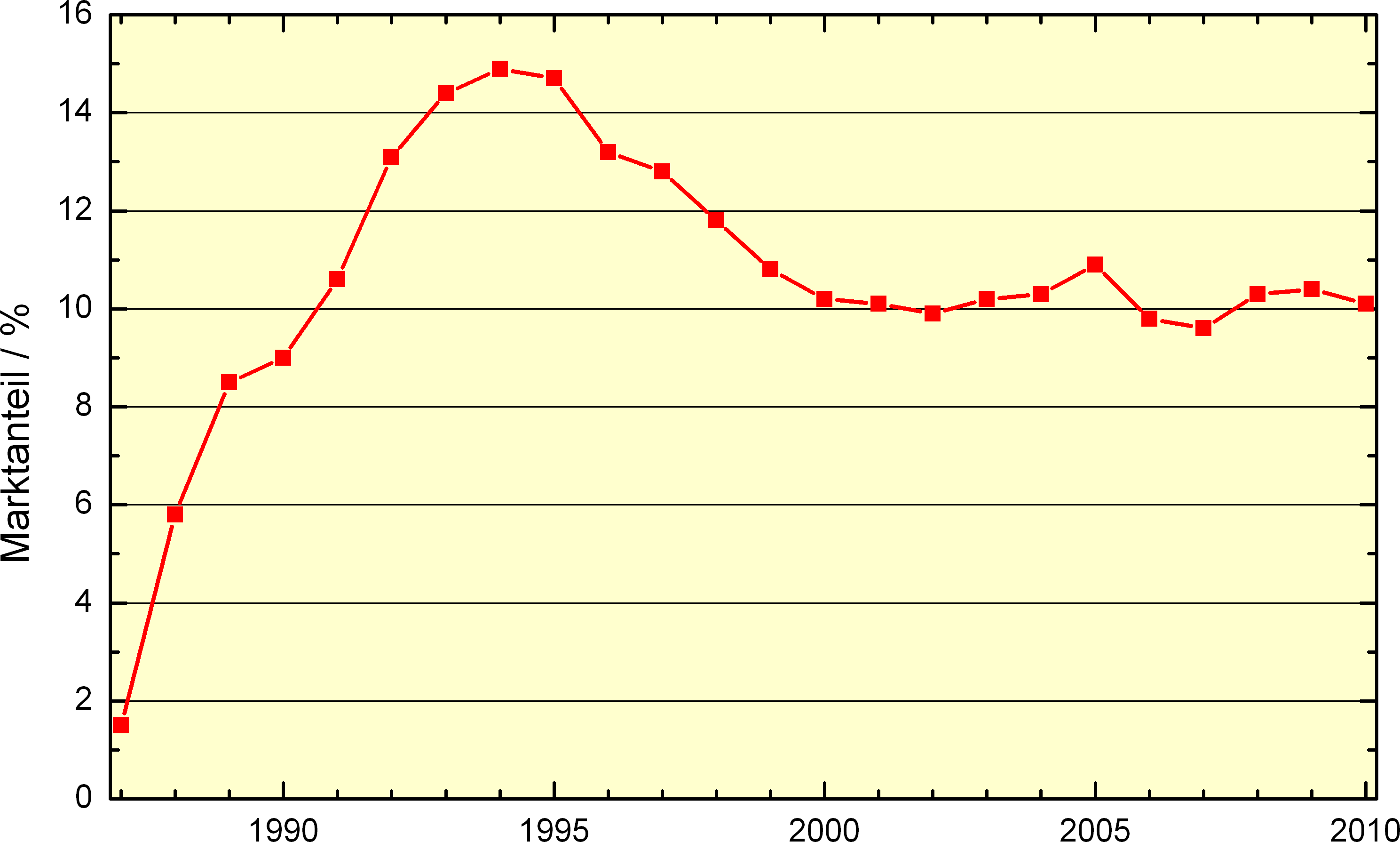 Entwicklung der Sat.1-Marktanteile von 1987 bis 2010. Jeweils aktueller Stand - alte Versionen sind in der Dateihistorie unten.